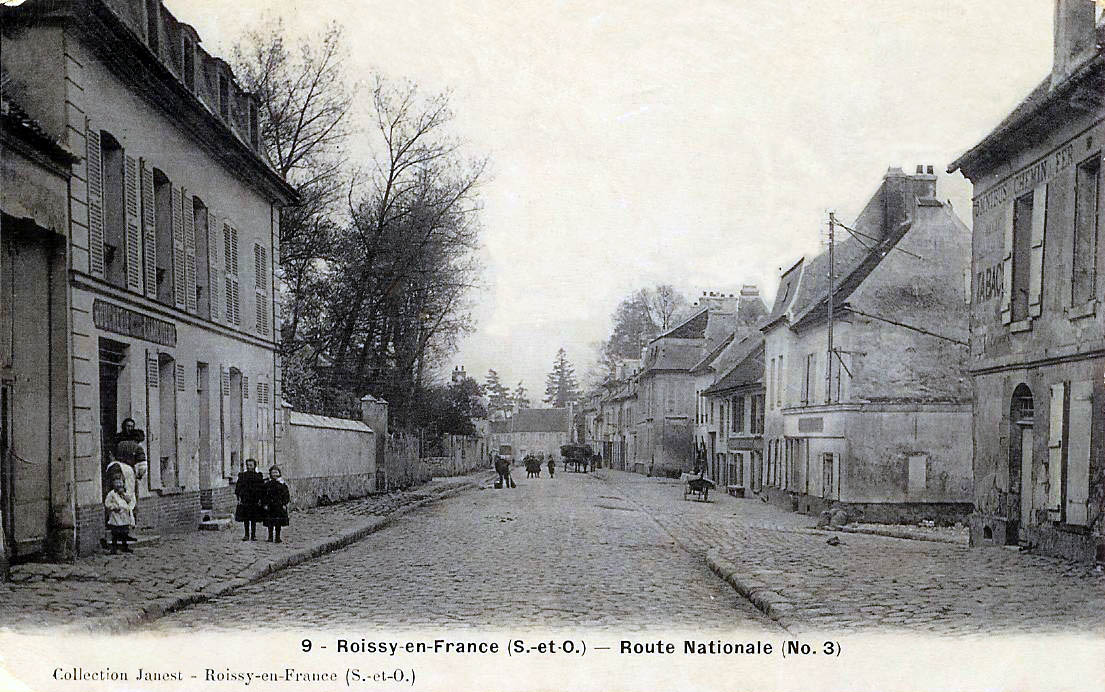 Roissy-en-France (Seine-et-Oise, France) - La "Route Nationale (No. 3)".